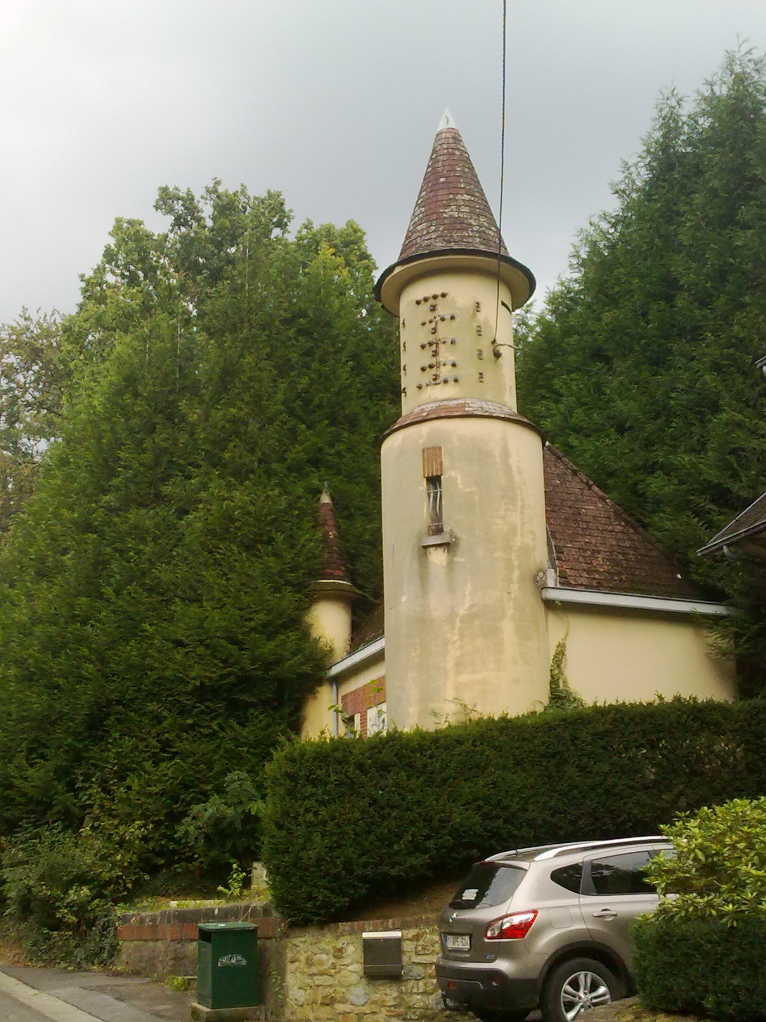 Cabine de Transformateur électrique (avenue des villas) Ottignies. Belgique.